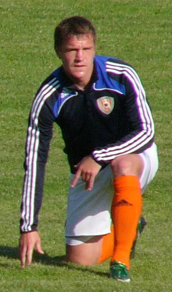 Константин Гордиюк 2009